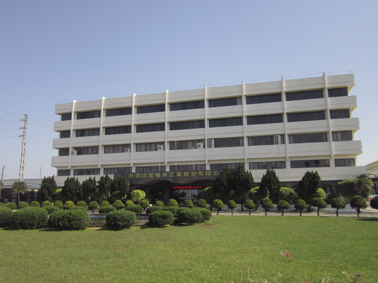 台灣山葉機車總部與中壢工廠，地址：桃園市中壢區中華路二段3號。